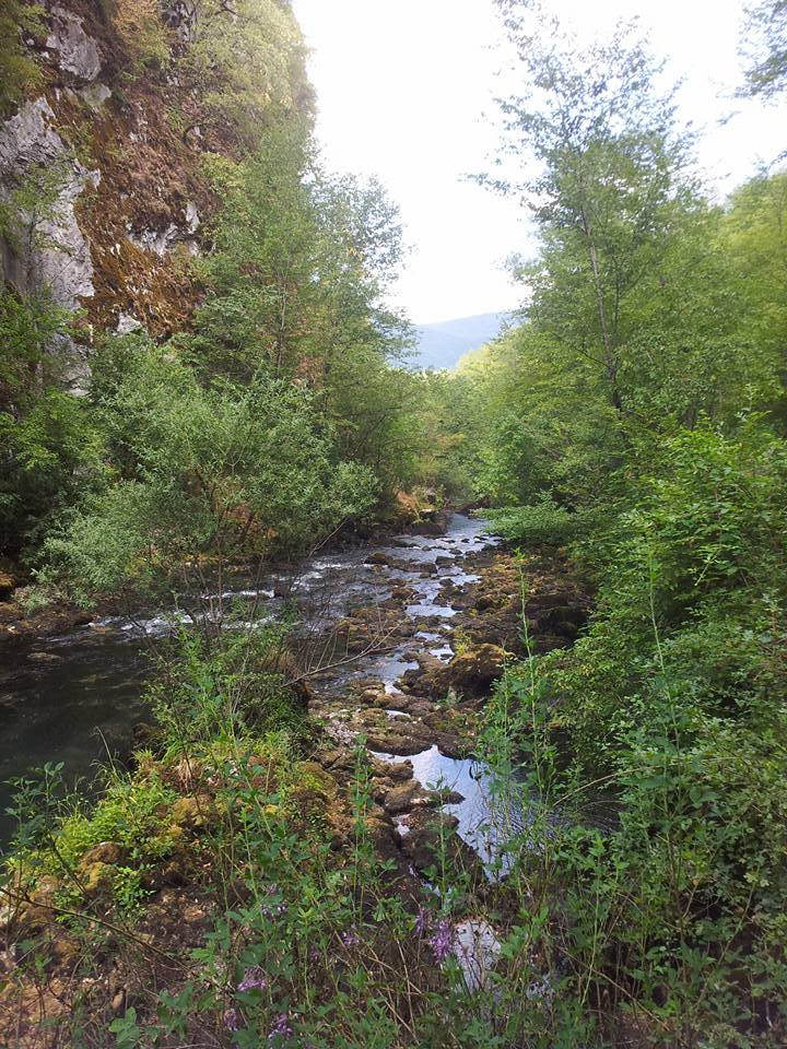 Izvor rijeke Sanice, lijeve pritoke rijeke Sane.